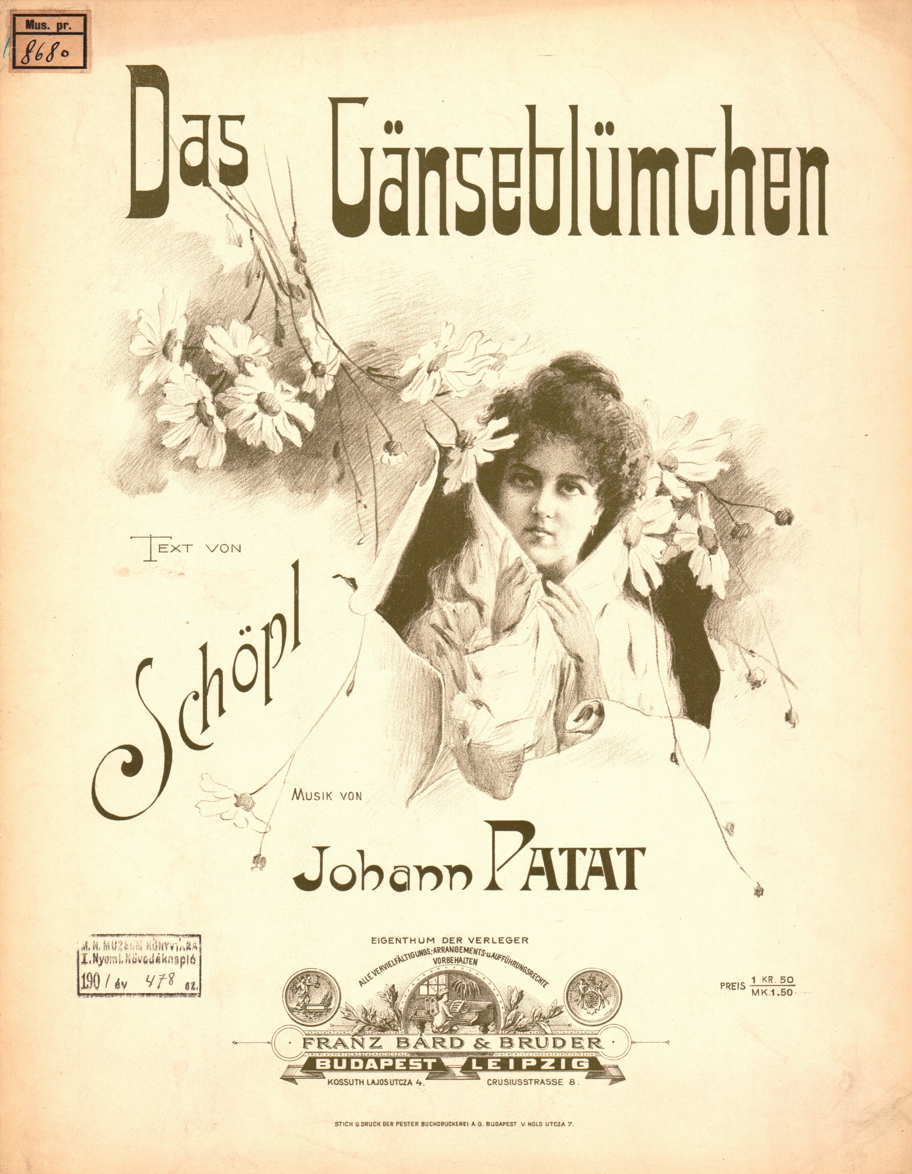 Johann Patat szerzeményének címlapja